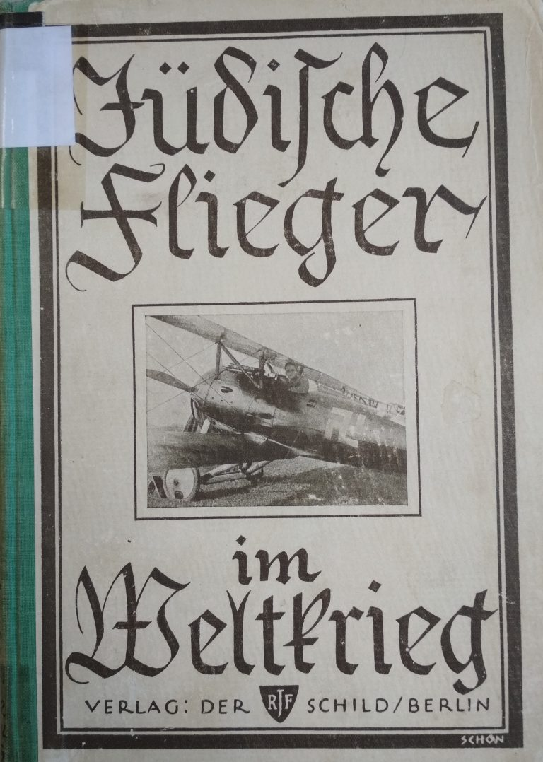 טייסים יהודים במלחמת העולם הראשונה